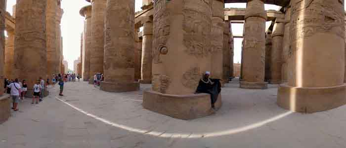 Tempelj Karnak